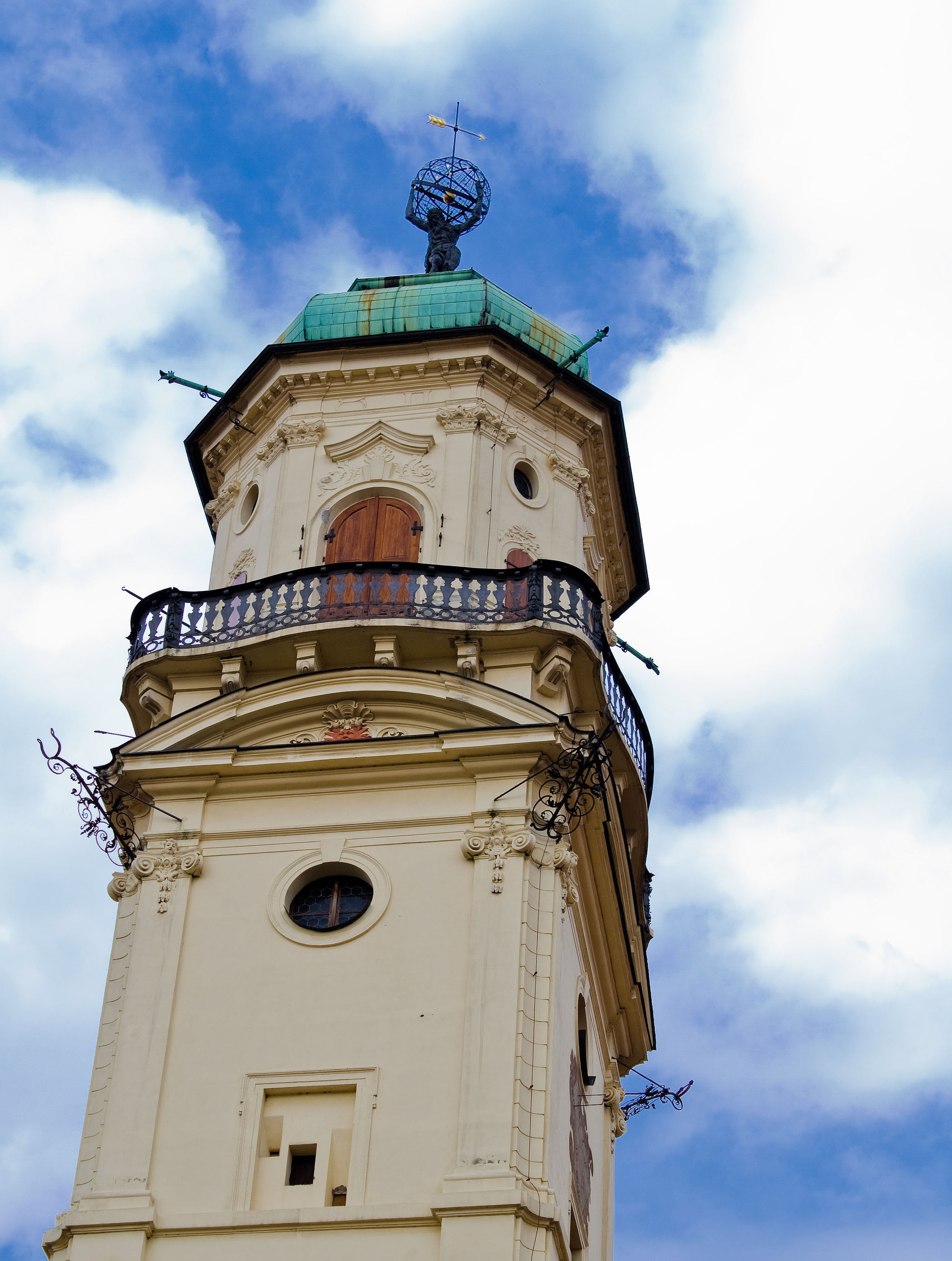 Kolej Klementinum - věž